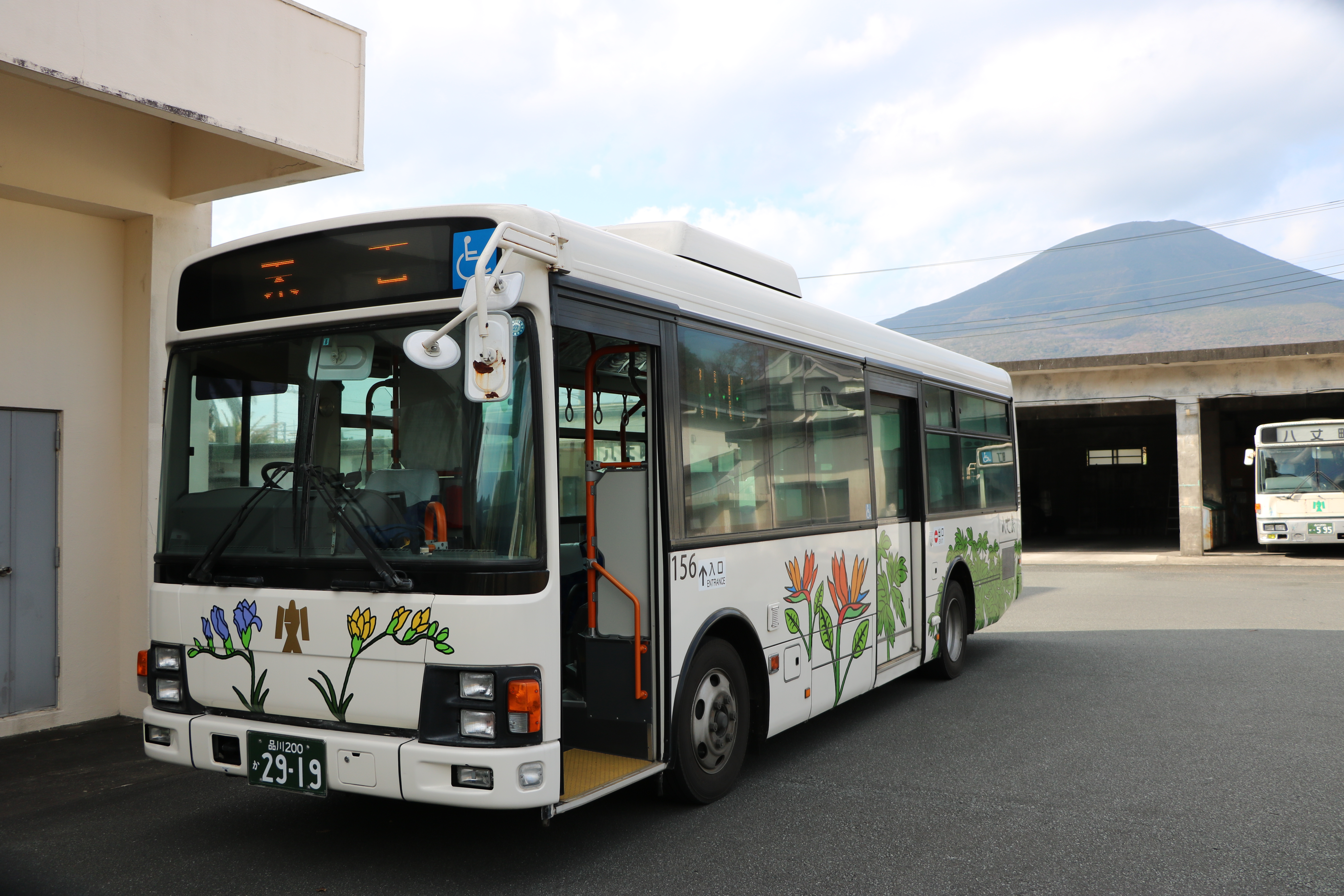 八丈町営バス（末吉行き）